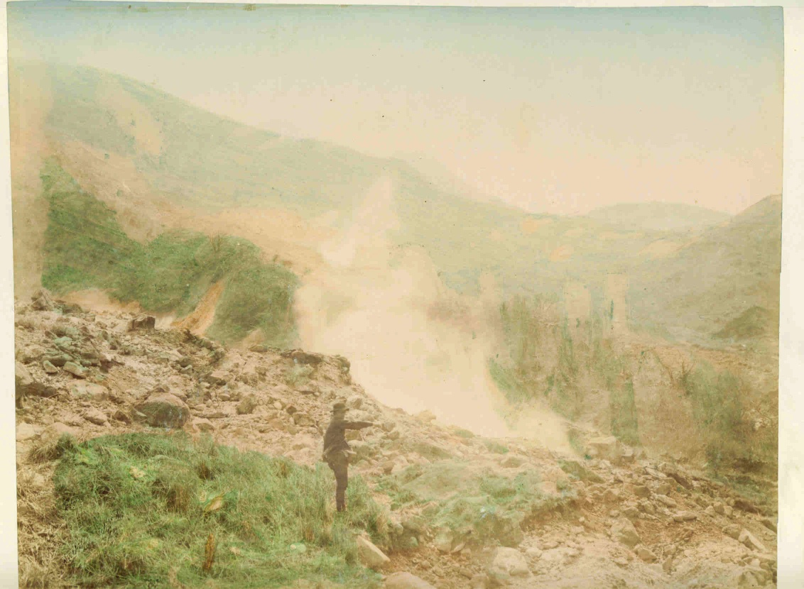 Fotograf: Ogawa Kazumasa (Nagasaki ID 189, dort bezeichnet als Owakudani) „Schwefelquellen bei Miyanoshita (Handschriftlich unterhalb des Fotos betitelt). Handkoloriertes Albumin-Foto ca. 1880. Foto: 27,3 x 21,5 cm quer (aufgezogen auf Karton: 48,5 x 33 cm).